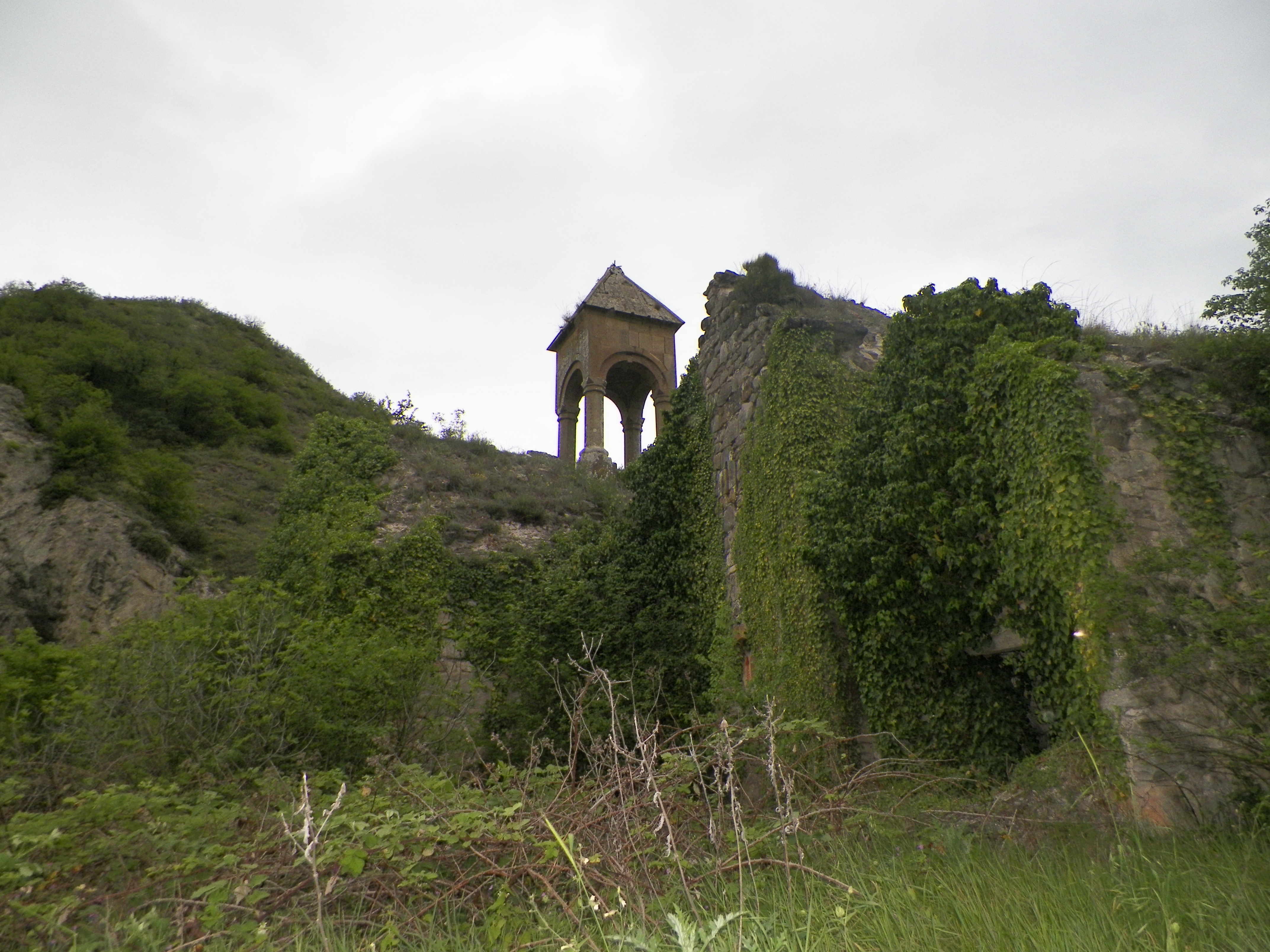 Գտնվում է Արցախի Հանրապետության Մարտակերտի շրջանի Մադաղիս գյուղից 7 կմ հեռավորության վրա, Ջրվշտիկ ջրվեժի մոտ